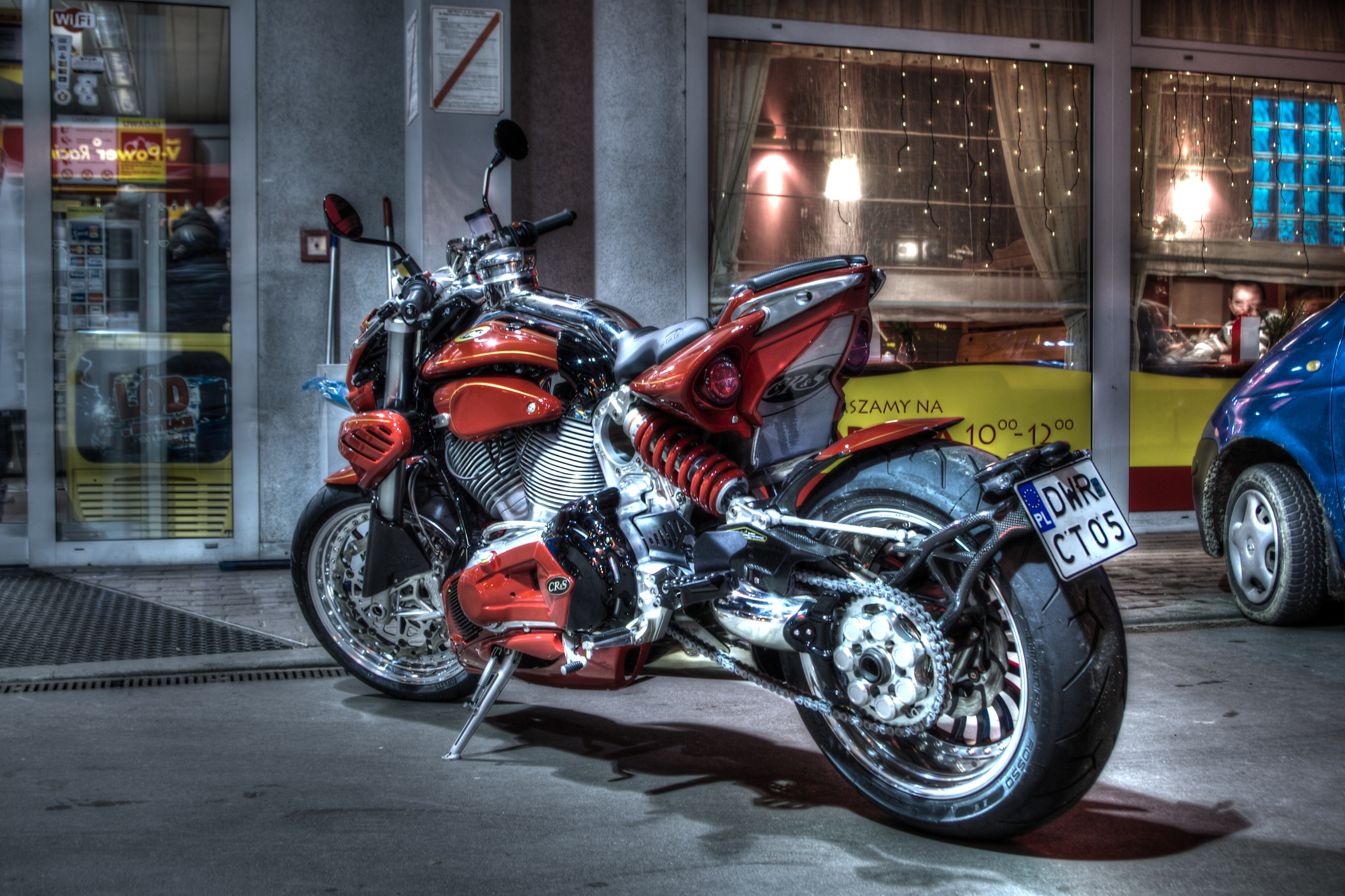 Ekskluzywny motocykl CR&S DUU włoskiej produkcji. Zdjęcia wykonano dzięki importerowi firmie K+K z Dzierżoniowa.